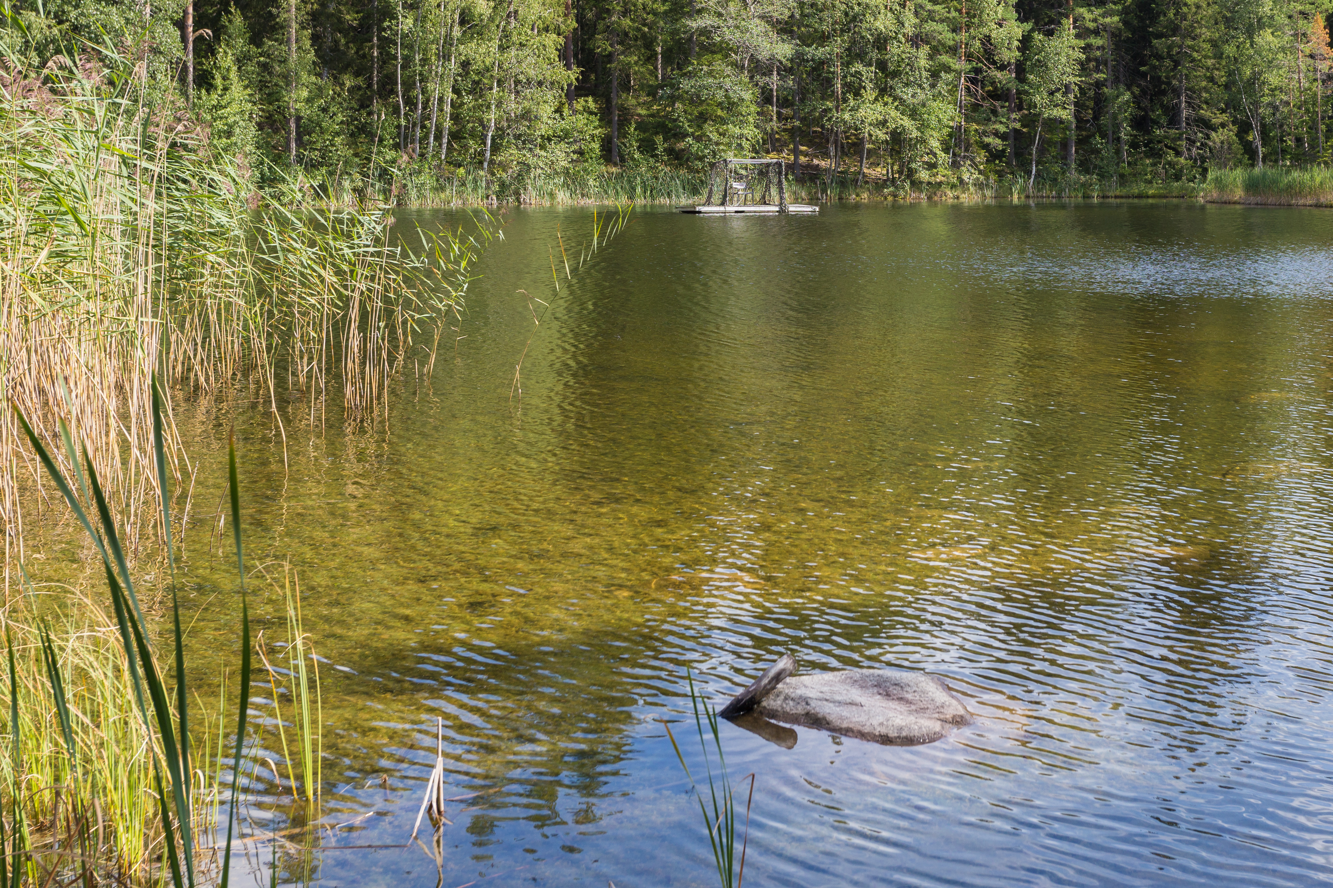 Sjön Lissjön, Hedemora kommun, Dalarnas län, Sverige